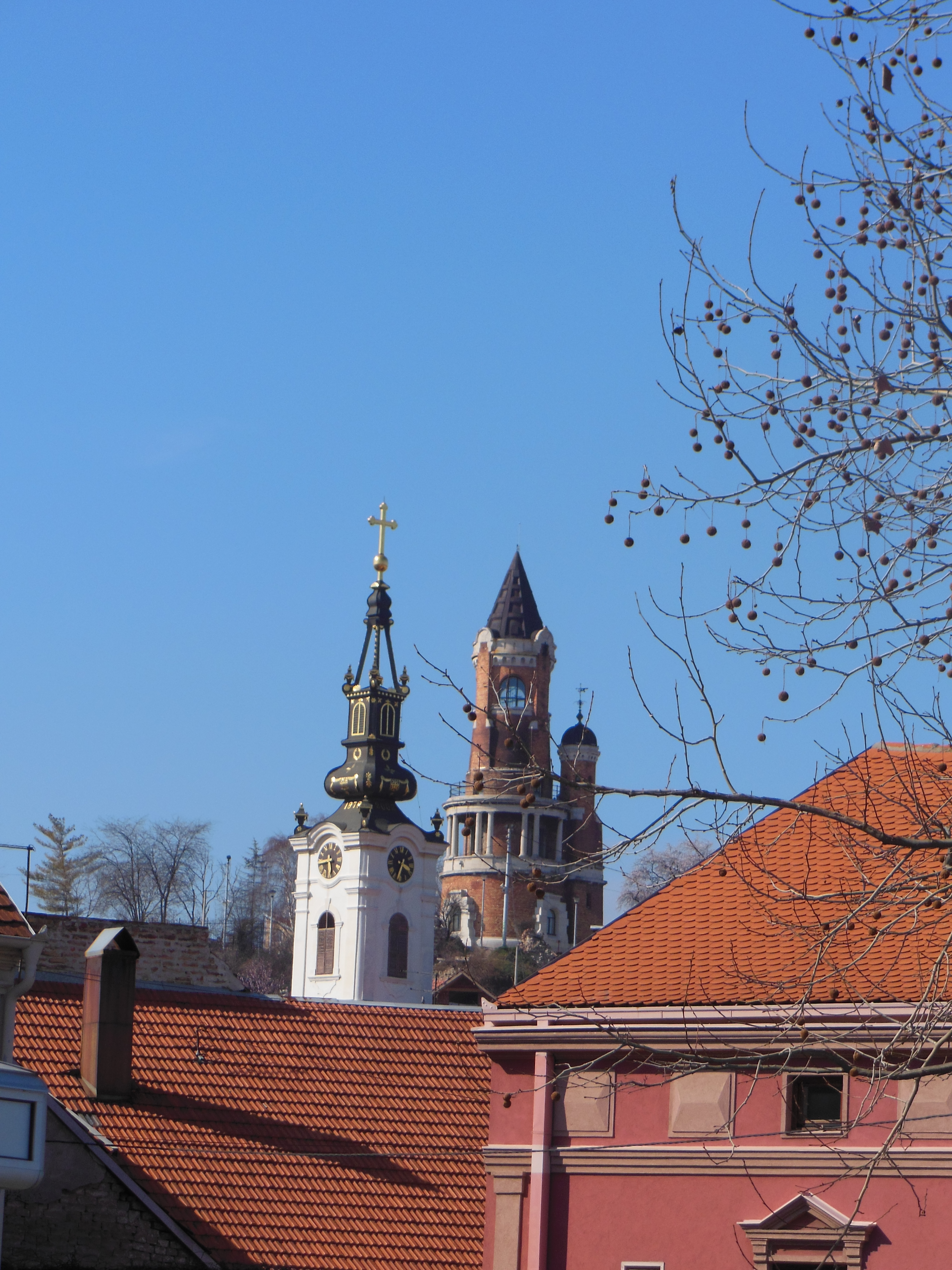 Pogled na Gardoš, Zemun, 2014/03/01